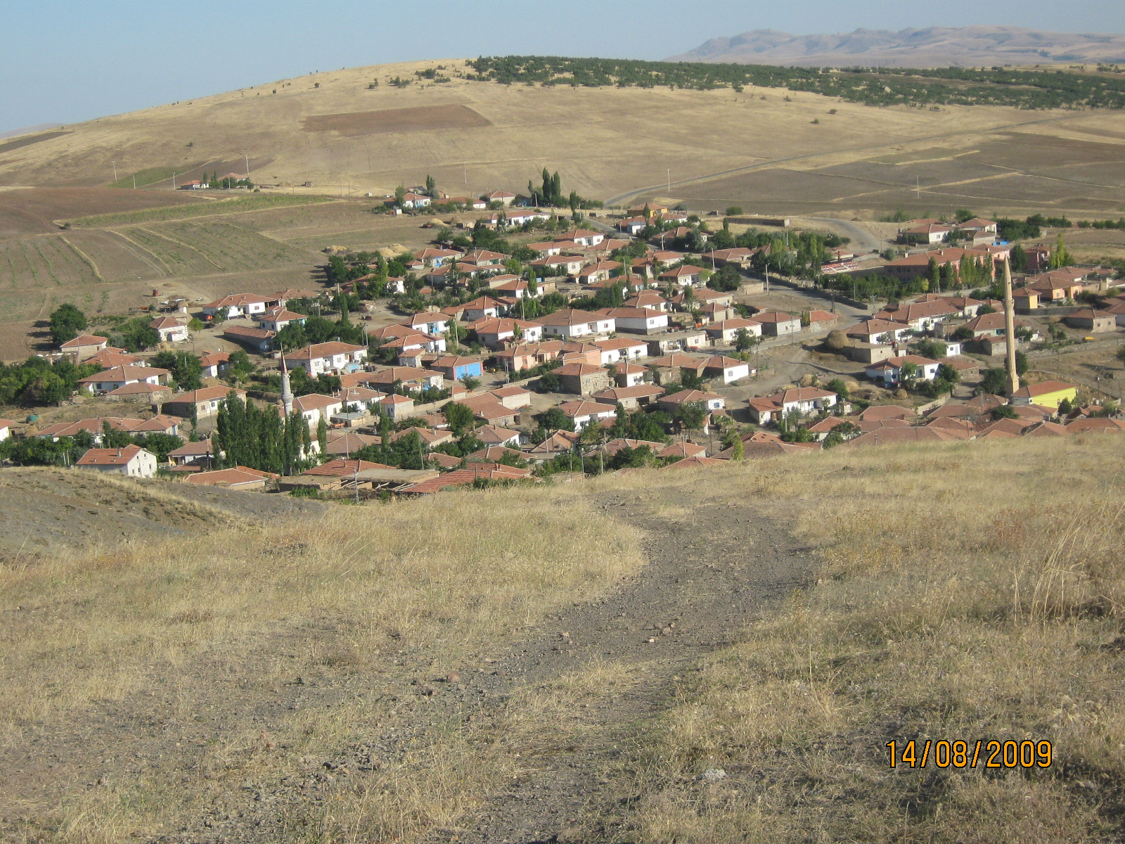 Harman Yerinden Köyün genel görünüşü